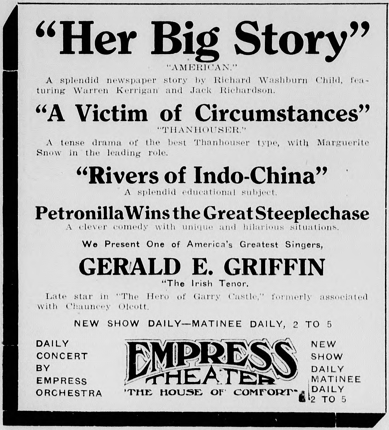 Her Big Story advertisement